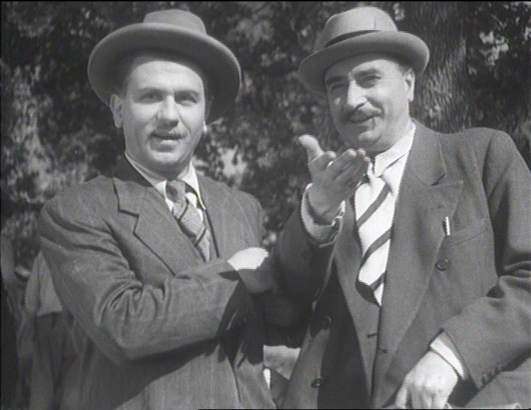 Screenshot del film Quattro passi fra le nuvole (1942) di Alessandro Blasetti.